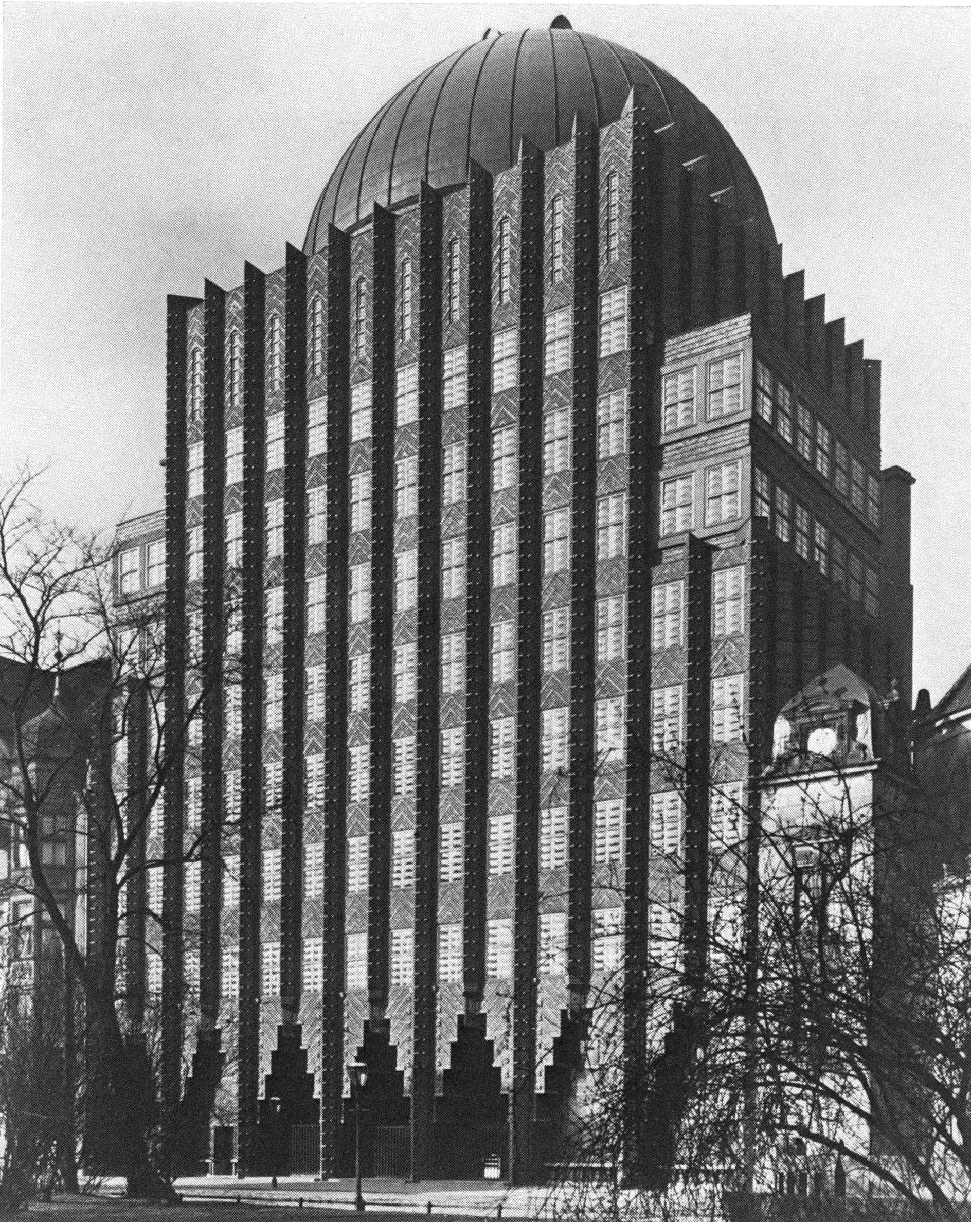 Außenansicht Anzeiger Hochhaus in Hannover